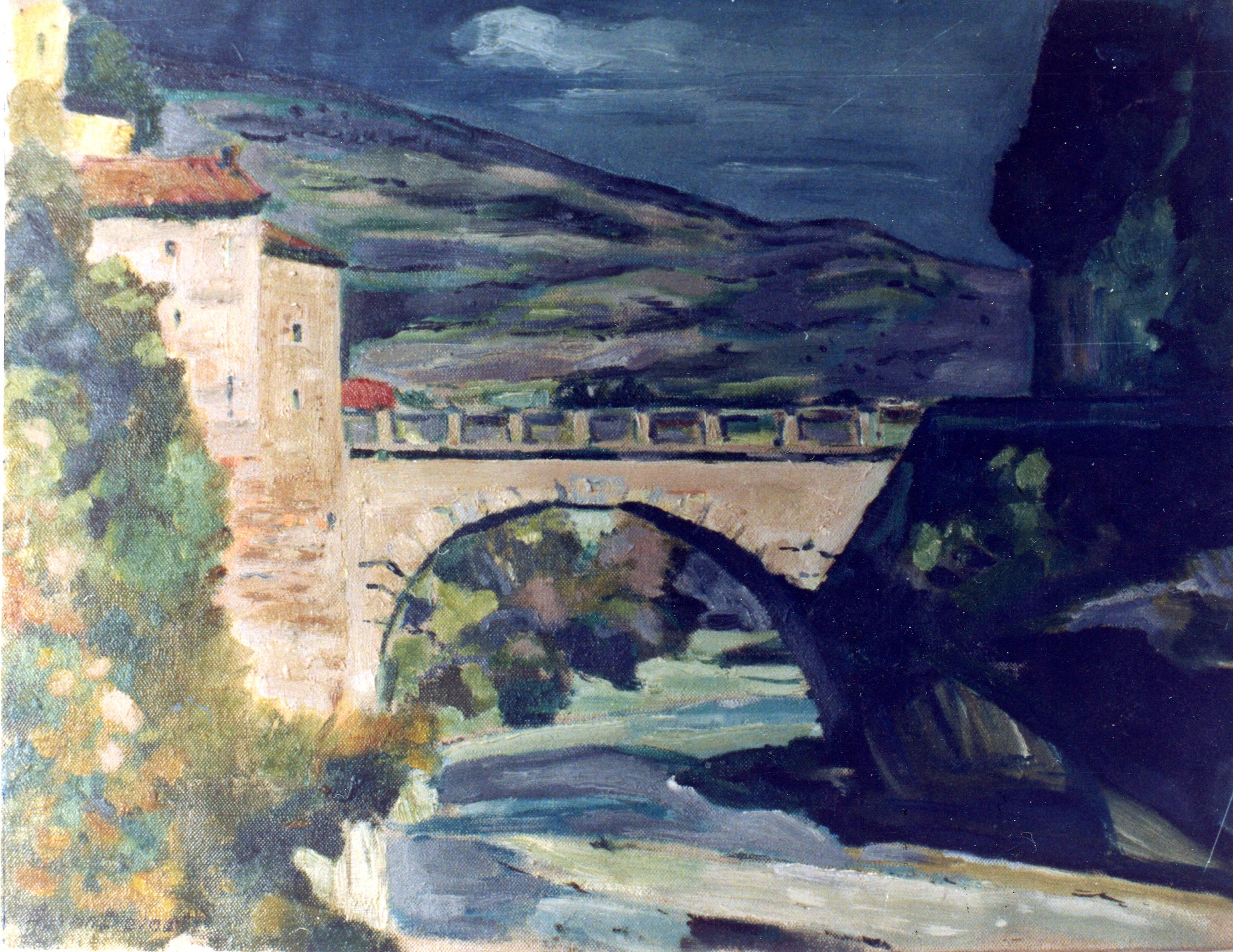 Huile sur toile par Léon van Dievoet, architecte, peintre, graveur et aquarelliste (1907-1993) le vieux pont de Vaison-la-Romaine.